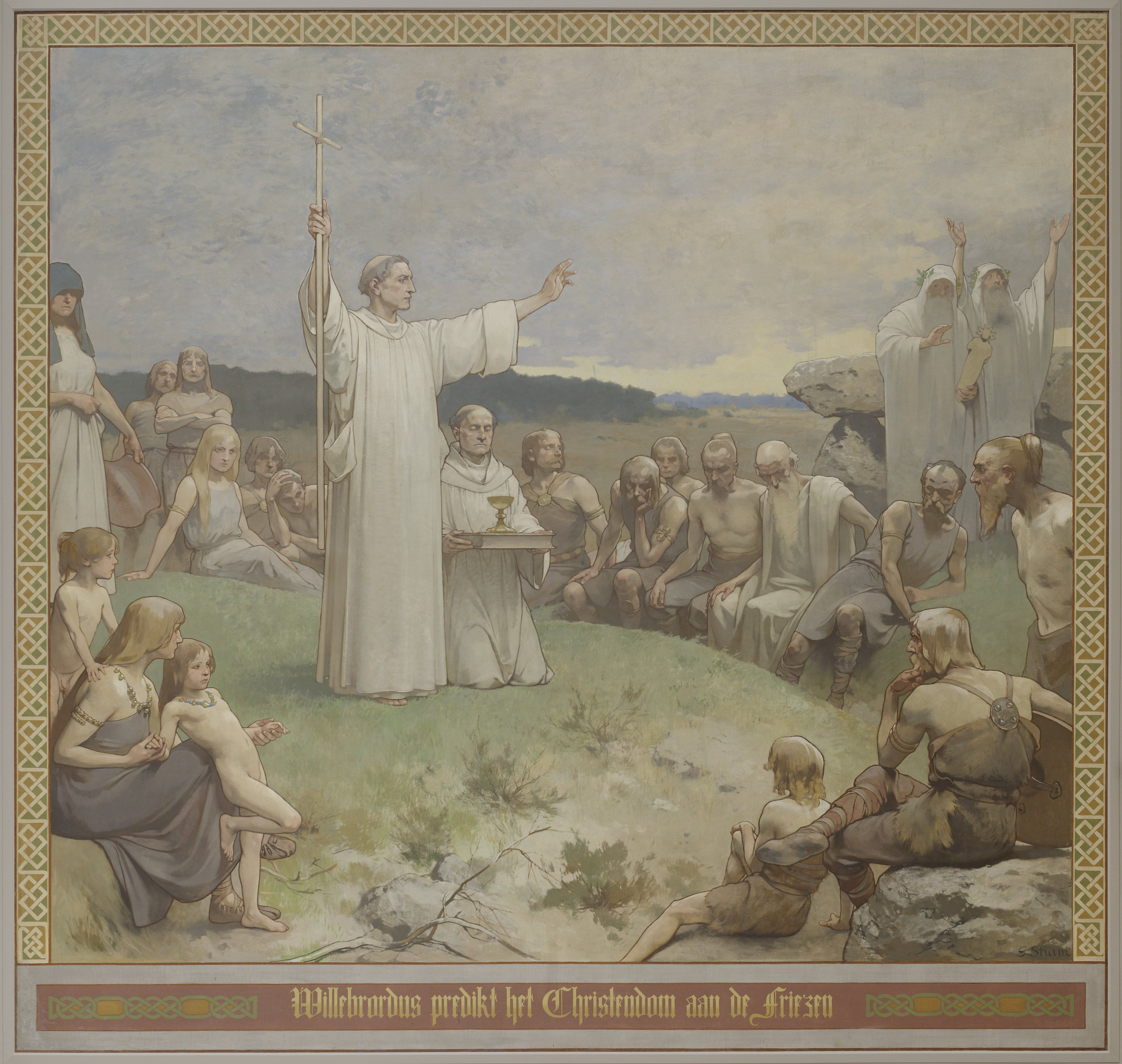 Schildering van Georg Sturm met de voorstelling Willibrordus predikt het Christendom aan de Friezen, aan de zuidelijke wand in de Voorhal